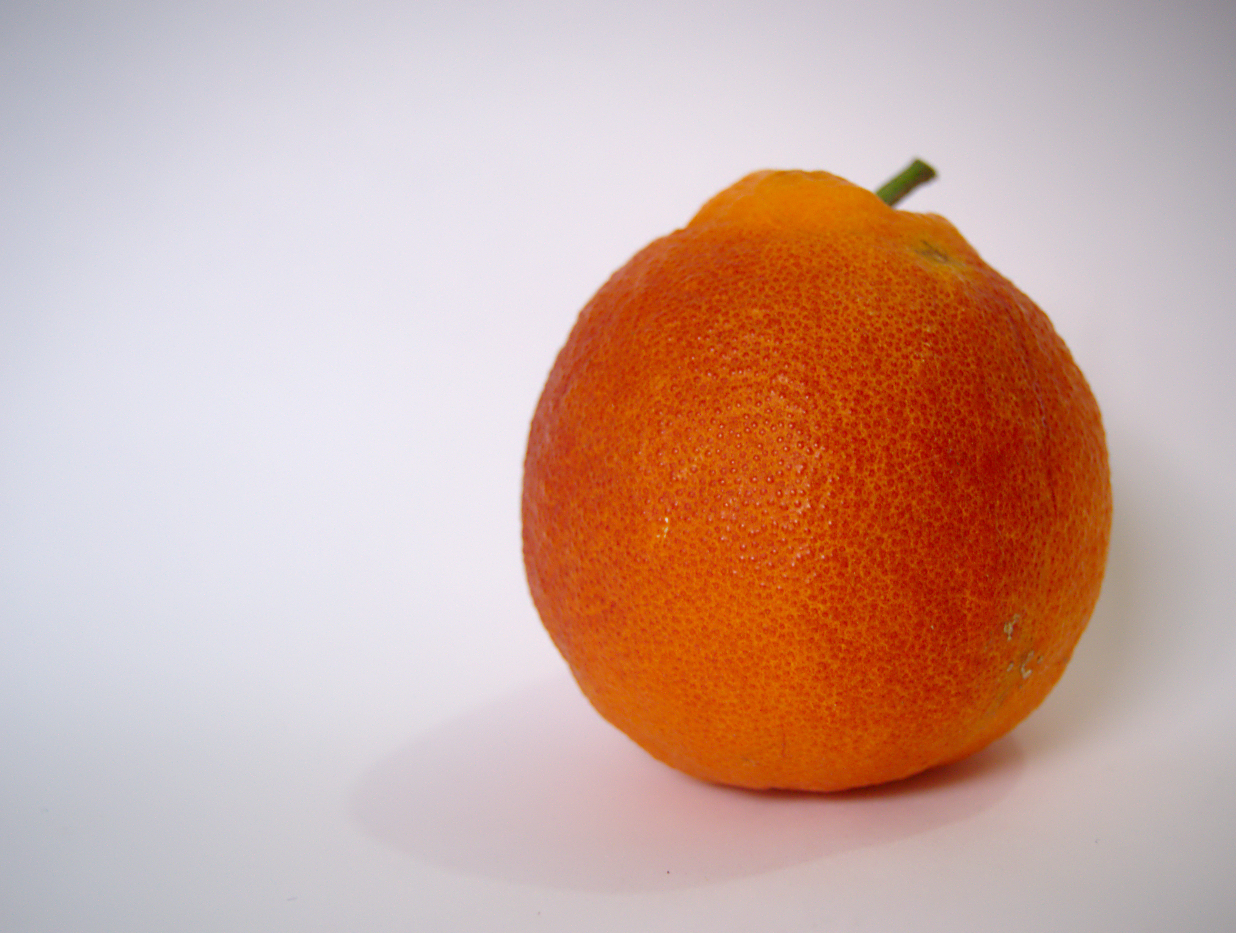 Orange sanguine de Tunisie This photograph was taken with a Nikon D3100.